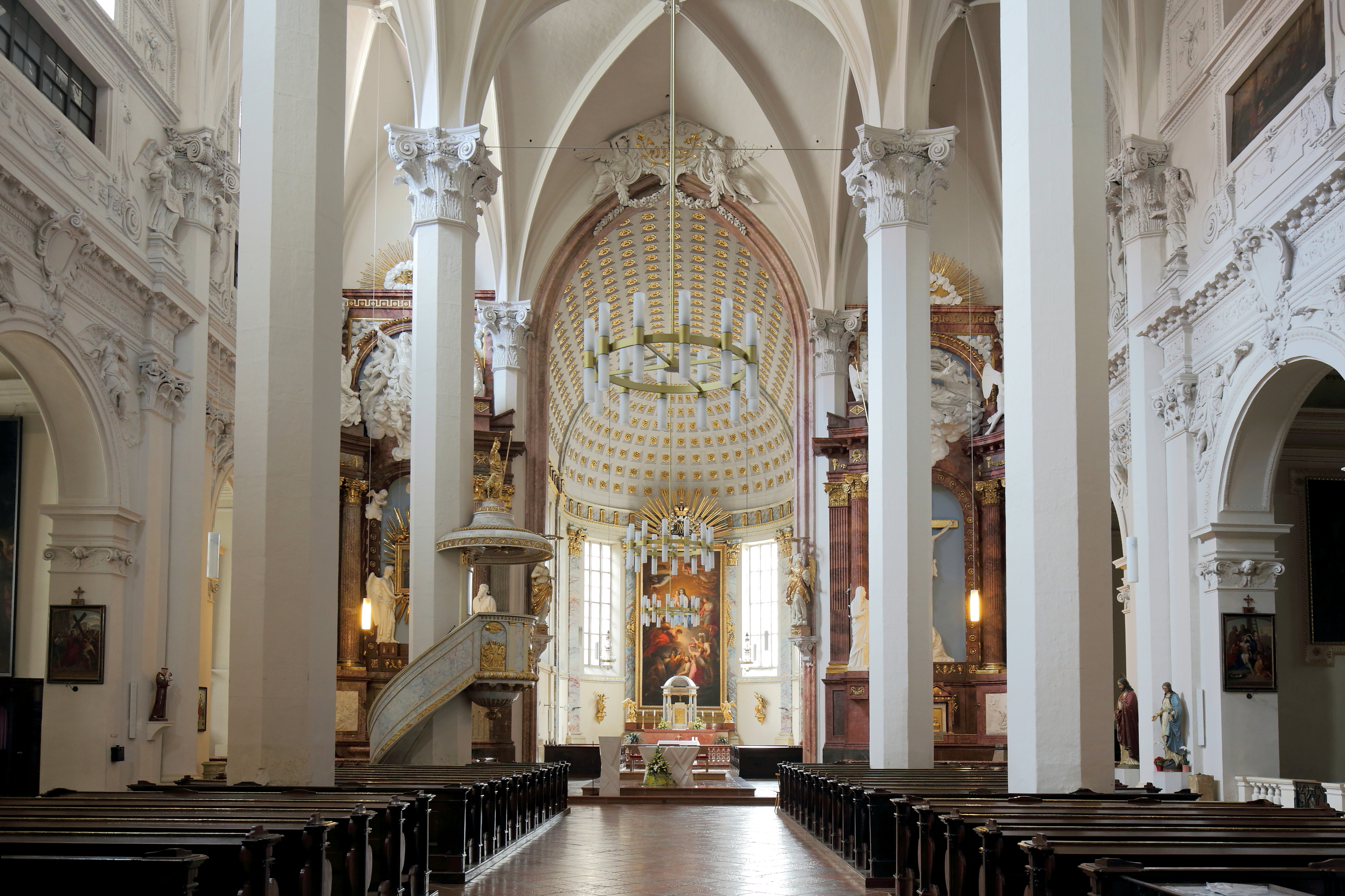 Innenansicht der Kirche am Hof, auch Kirche zu den neun Chören der Engel bezeichnet, im 1. Wiener Gemeindebezirk Innere Stadt.Im Vordergrund das dreischiffige Langhaus und im Hintergrund der im Jahr 1789 im klassizistischen Stil neugestaltete Chor- bzw. Altarraum.